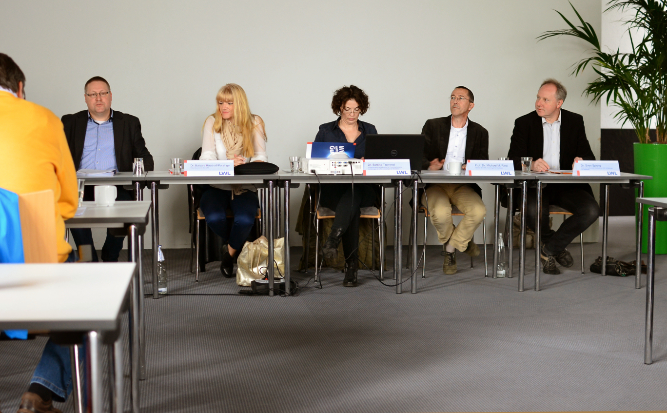 Pressekonferenz zum Römerlager Bielefeld